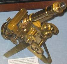 1850s microscope